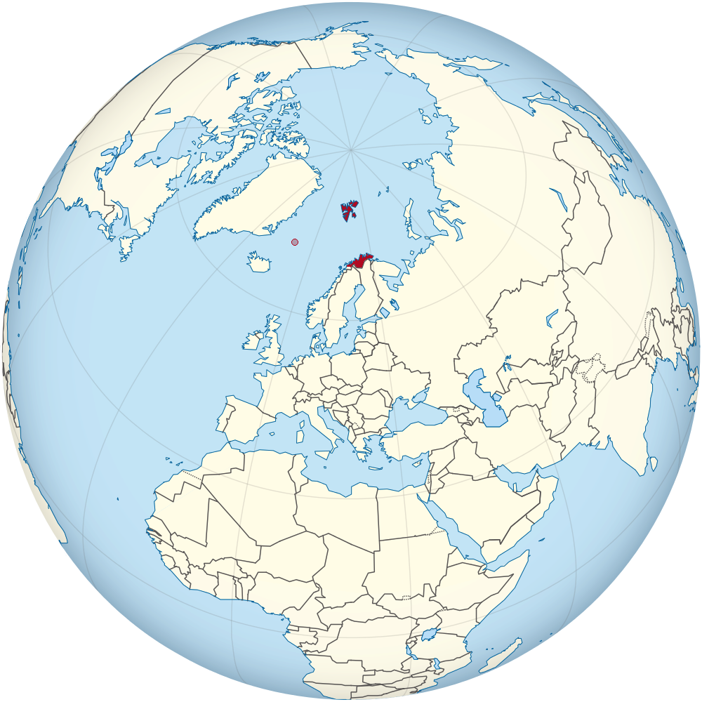 Norske områder med særstatus